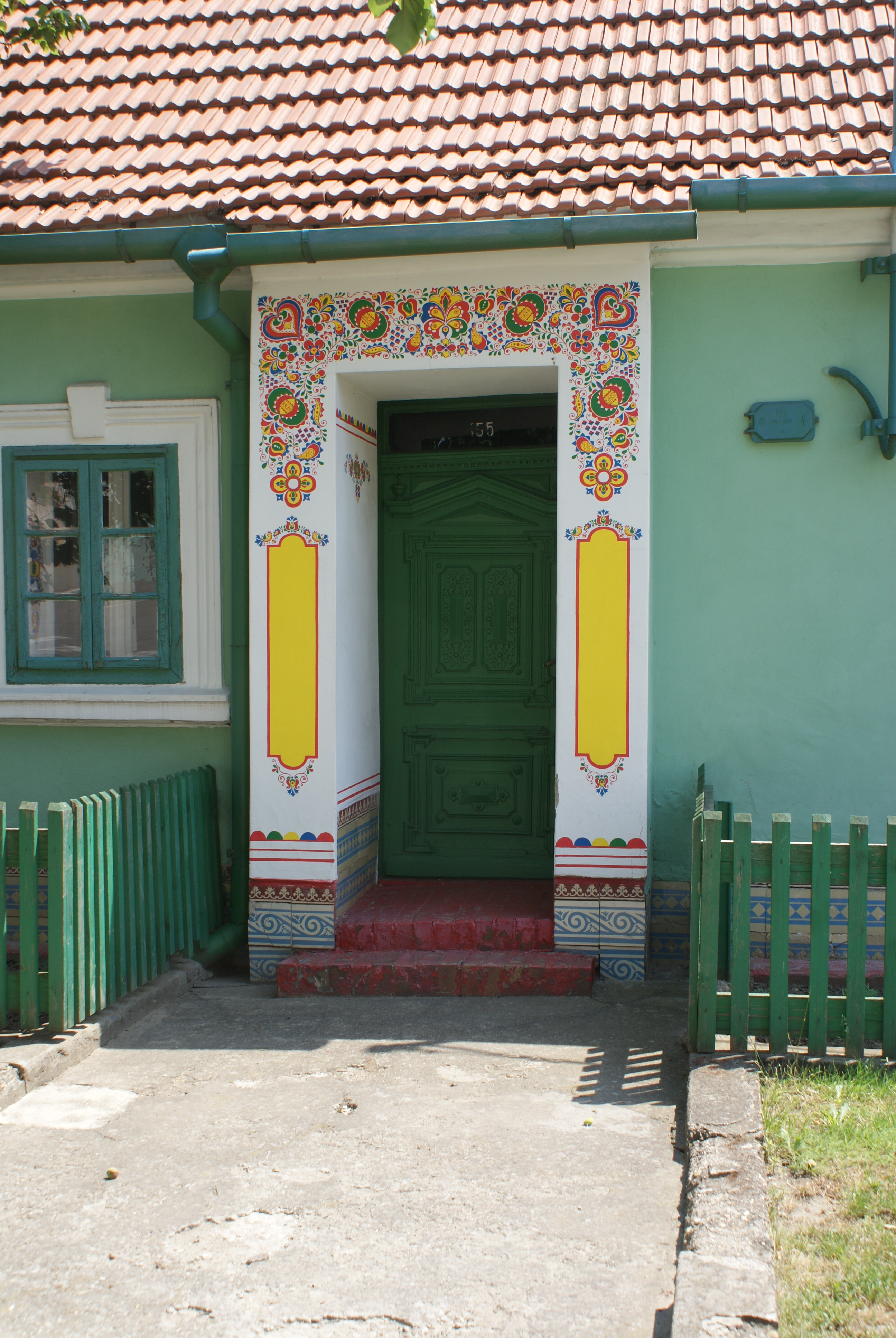 Lanžhot, a town in Břeclav District, Czech Republic, a rustic porch.